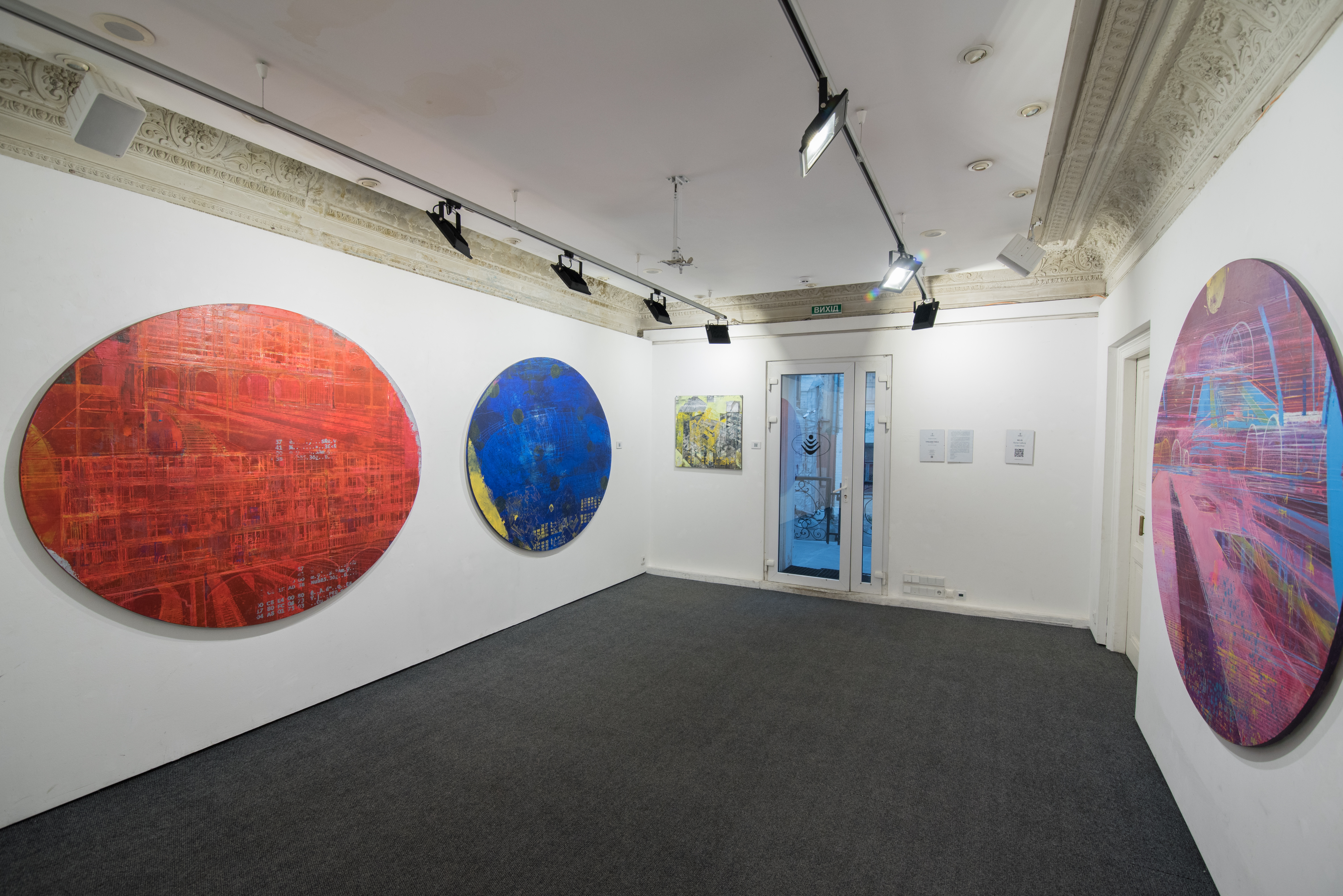 Karas Gallery Карась Галерея Андрій Блудов проект "Урбаністика" 2018